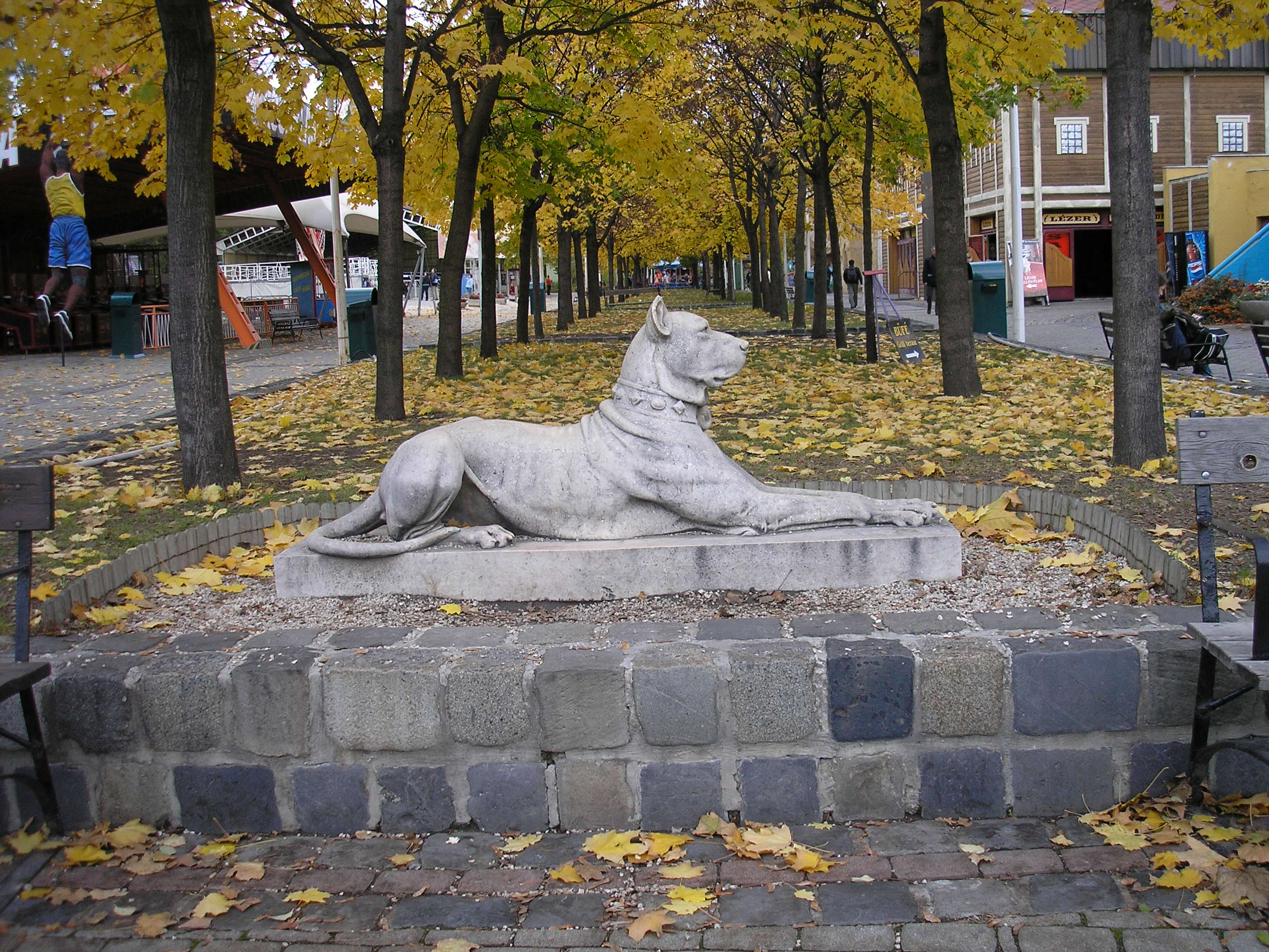 Kutyaszobor a budapesti vidámparkban